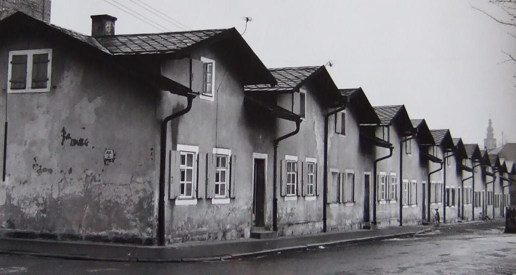 "Schweizer Häuschen" in der Bayreuther Sozialsiedlung Burg